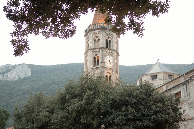 Campanile della chiesa di San Biagio, Finalborgo, Liguria, Italy